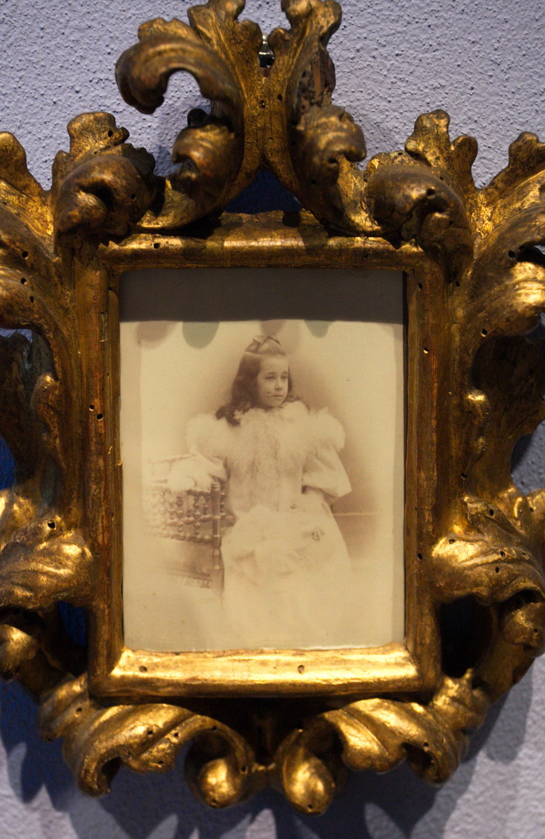 Foto de Maria Rusiñol (nena) de 1891 que es conserva al Museu Cau Ferrat de Sitges.